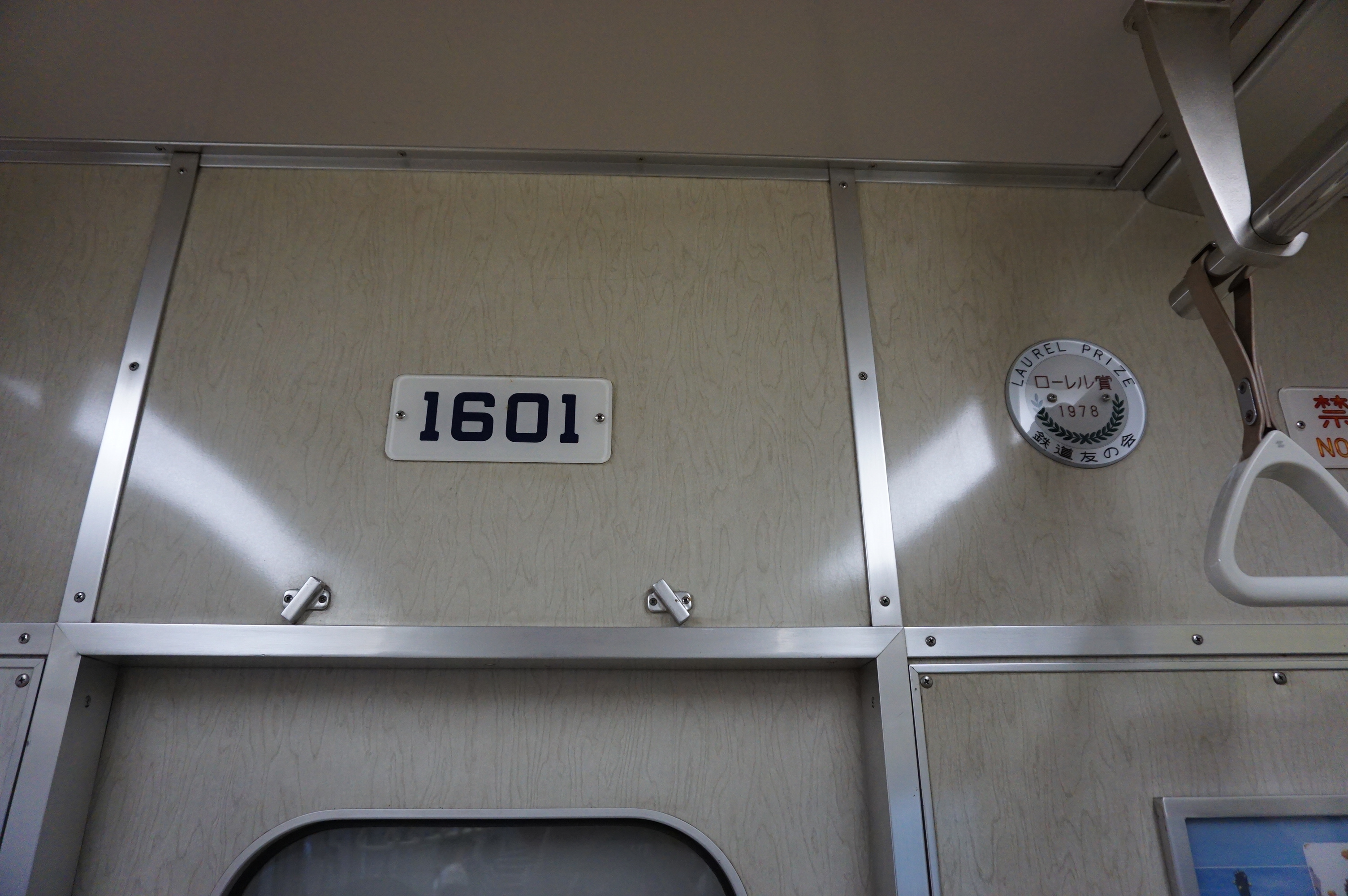 トップナンバー編成に付いているローレル賞のプレート